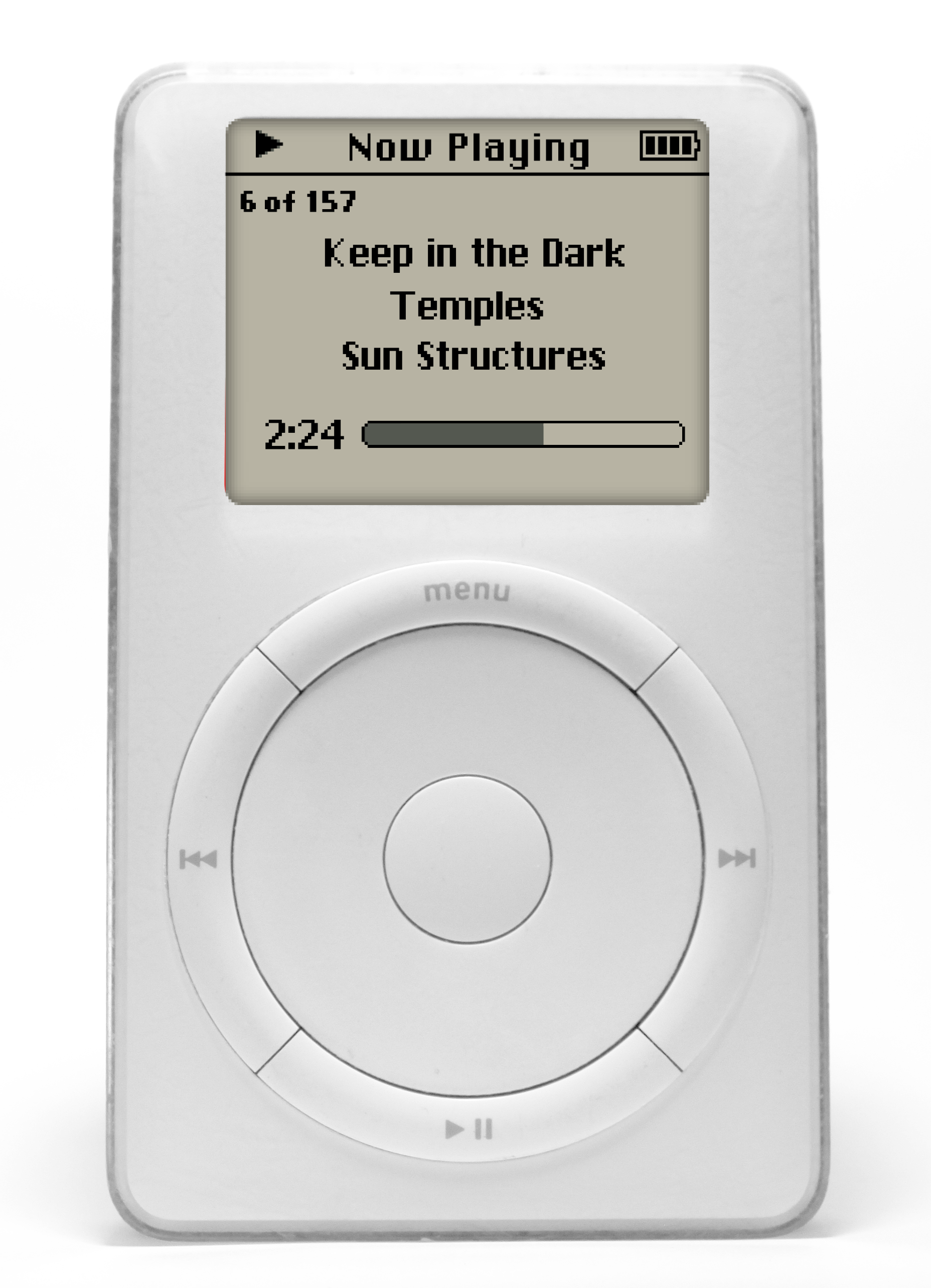 iPod 1G